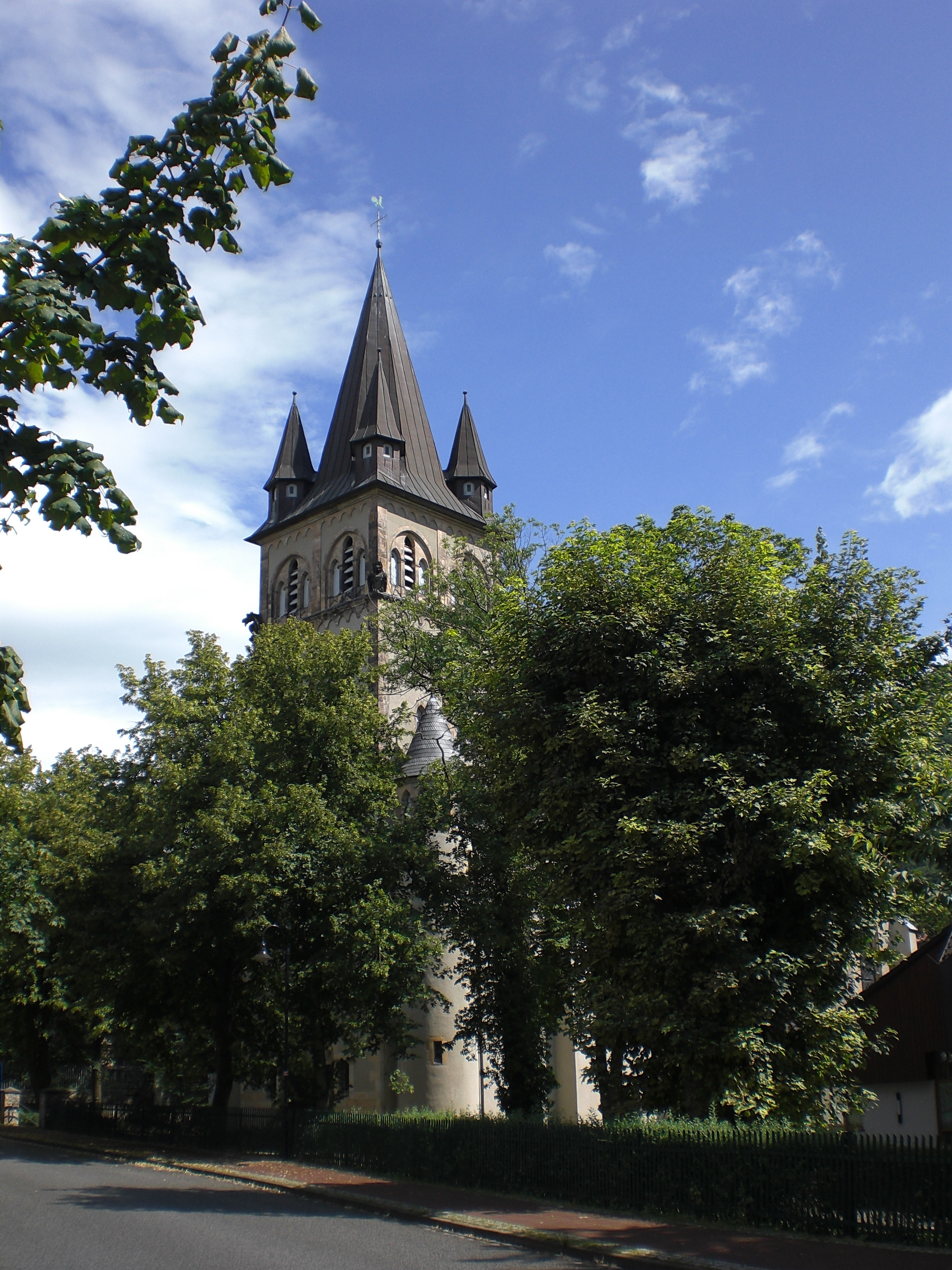 Herz-Jesu-Kirche Thale, Nordseite